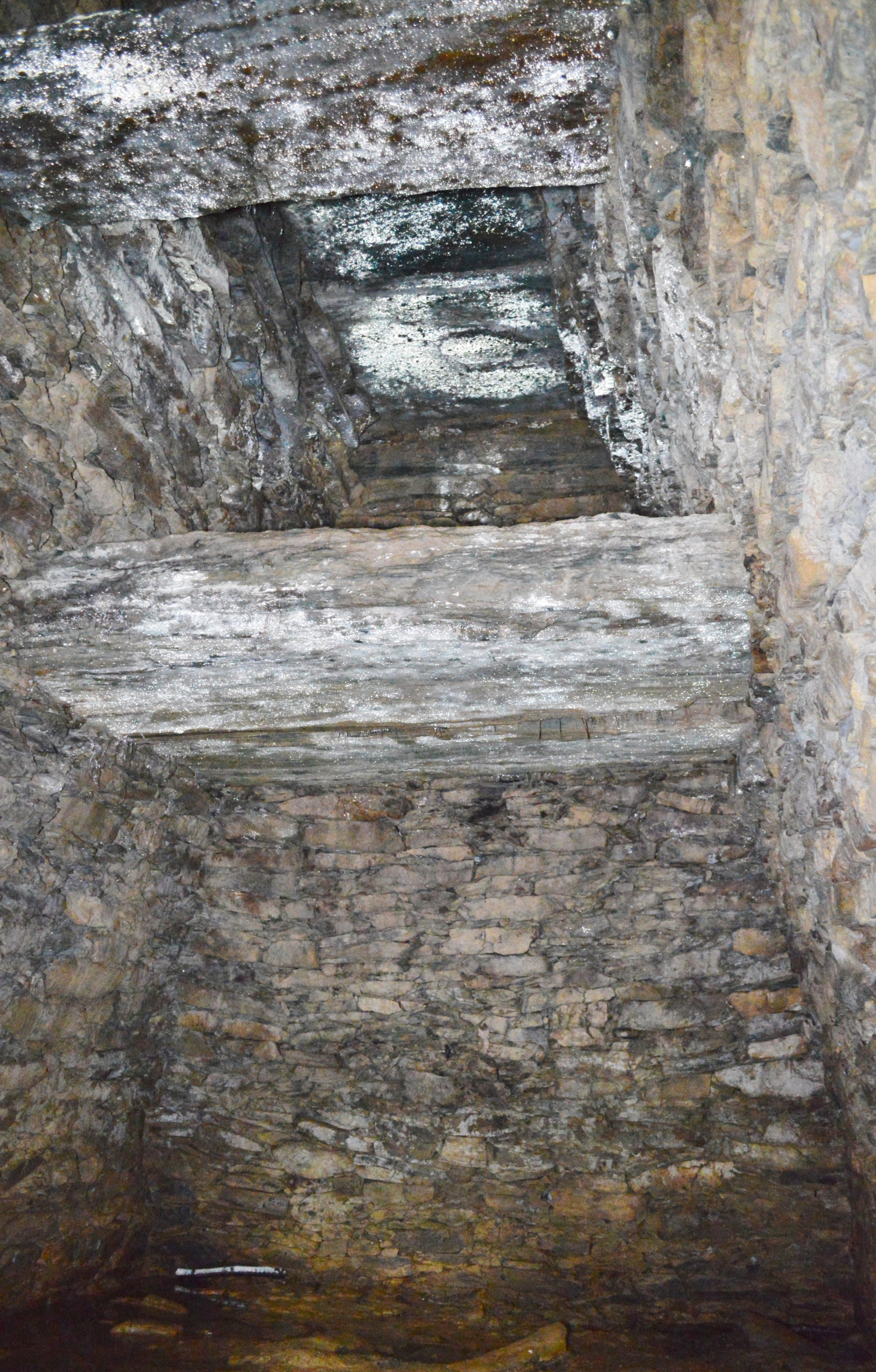 大谷山22号墳 玄室 (奥壁側)